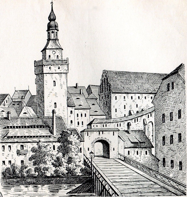 Zeichnung des Neißeturmes und Neißetores in Görlitz